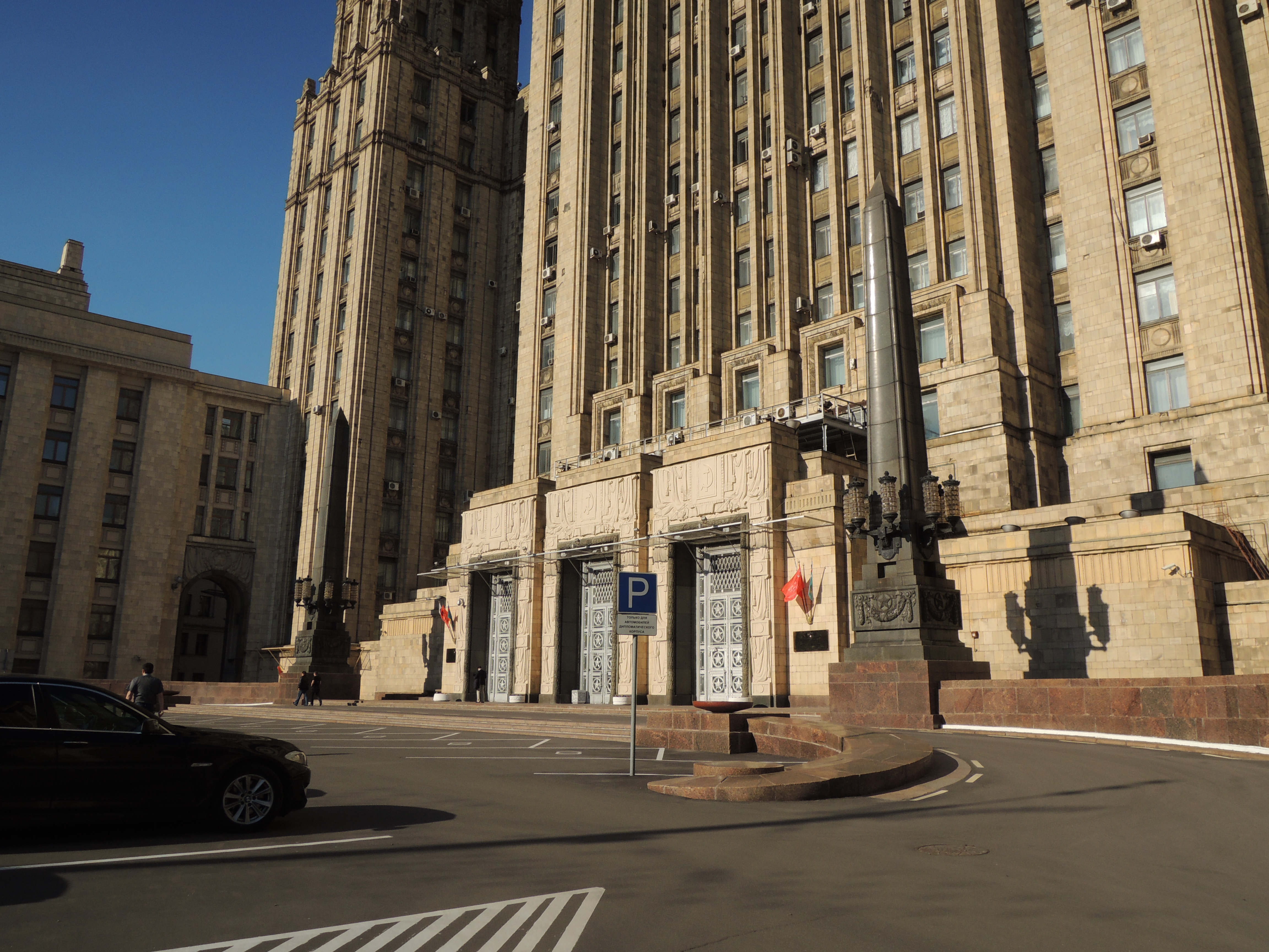 Здание Министерства иностранных дел России